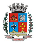 Brasão do Municipio de Iúna - ES